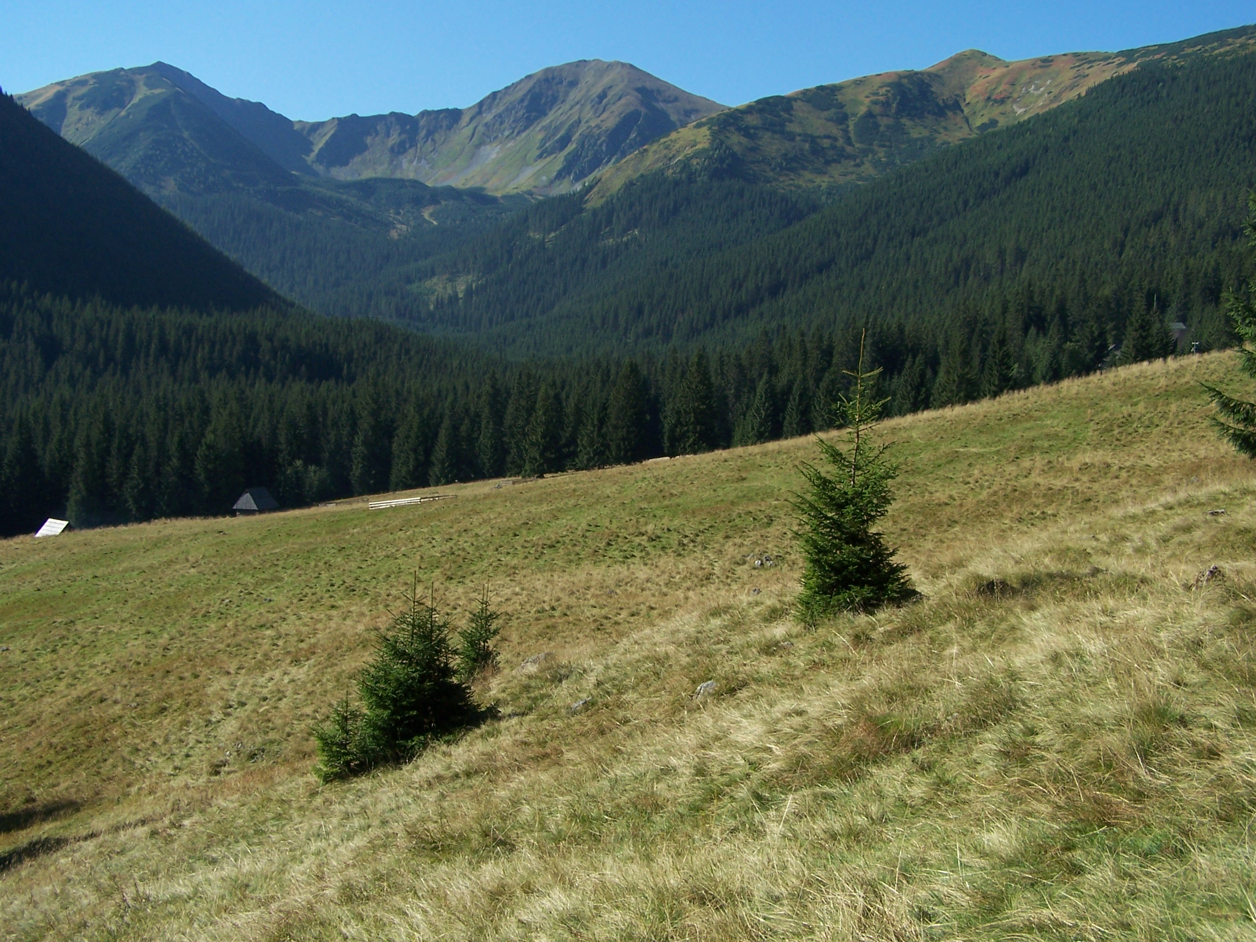 Mnichy Chochołowskie (Dolina Chochołowska)